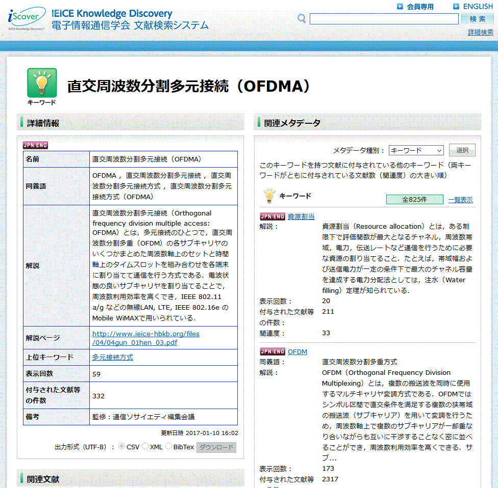 検索キーワードのメタデータ表示